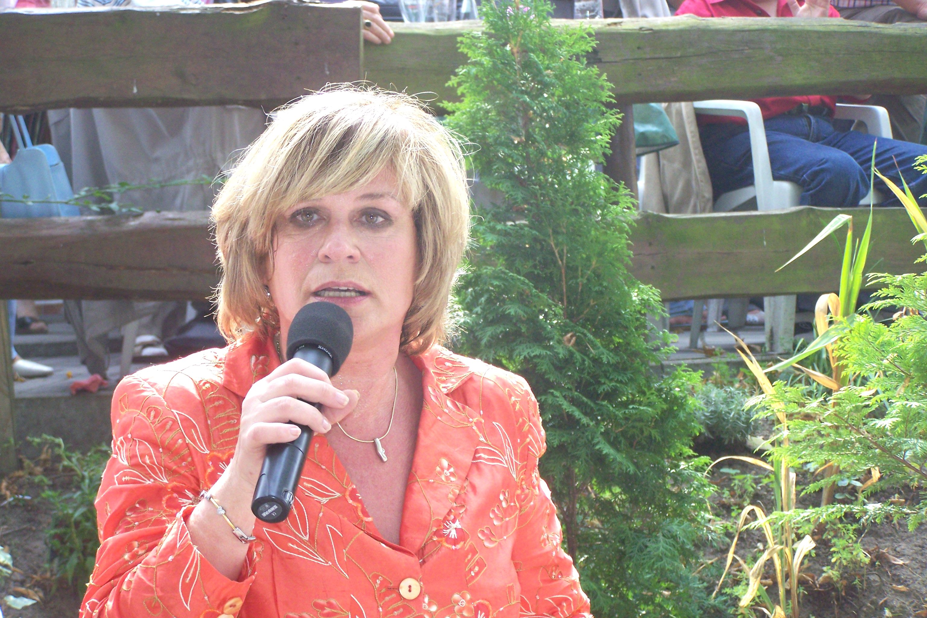 Mary Roos auf dem Bierer-Berg-Fest am 19.08.2007